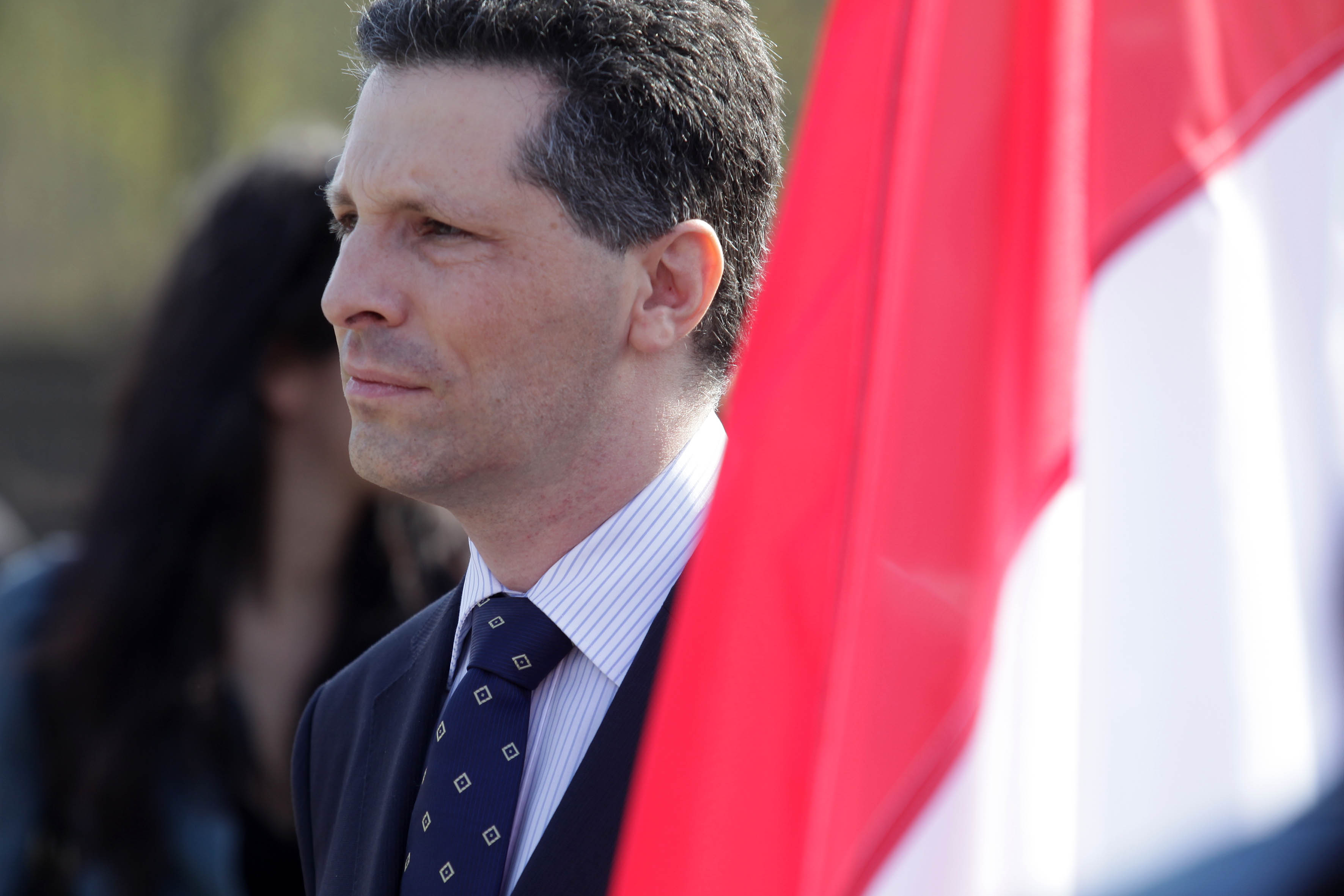 Schiffer András; koszorúzás a 301-es parcellában.